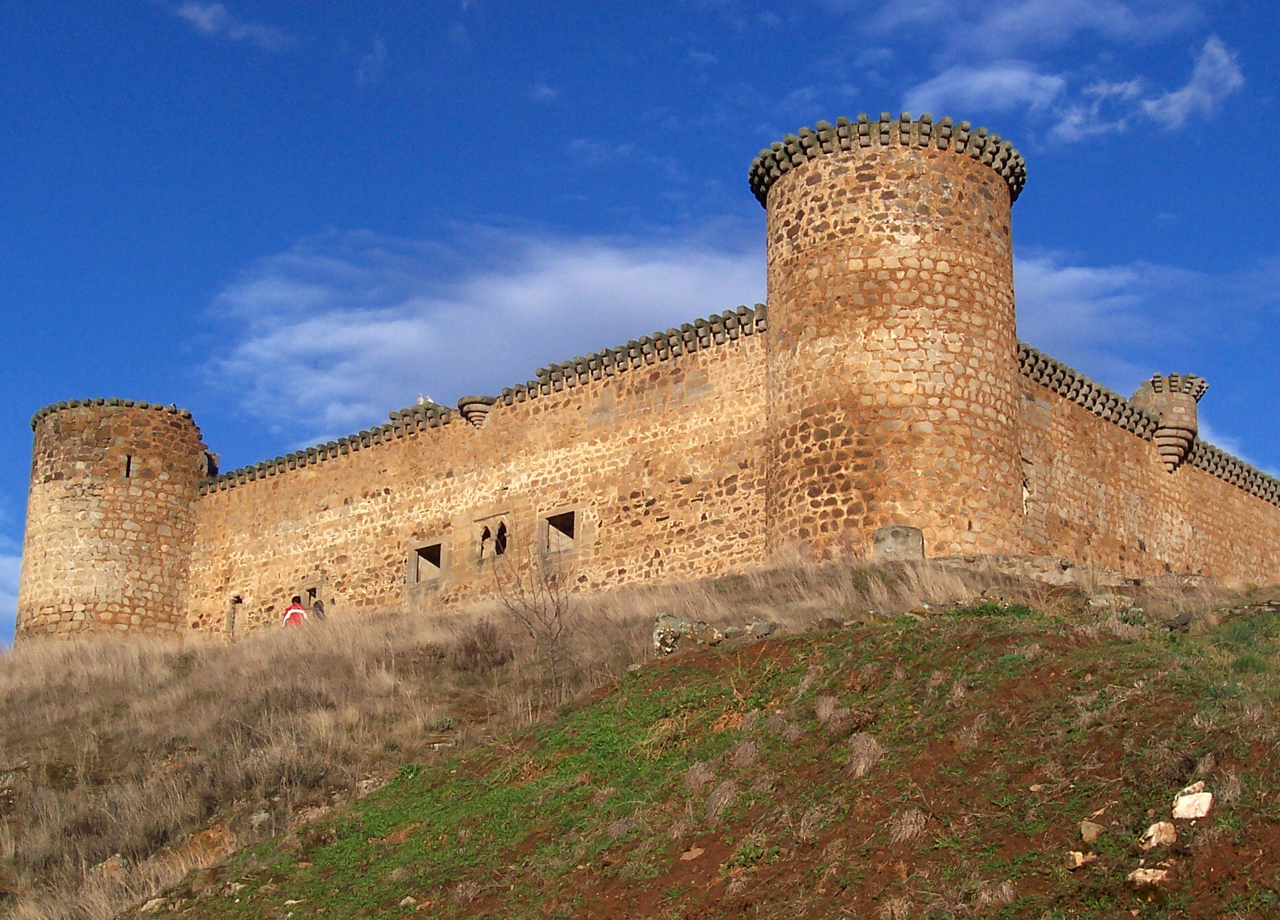 Castillo de El Barco de Ávila, provincia de Ávila (España)